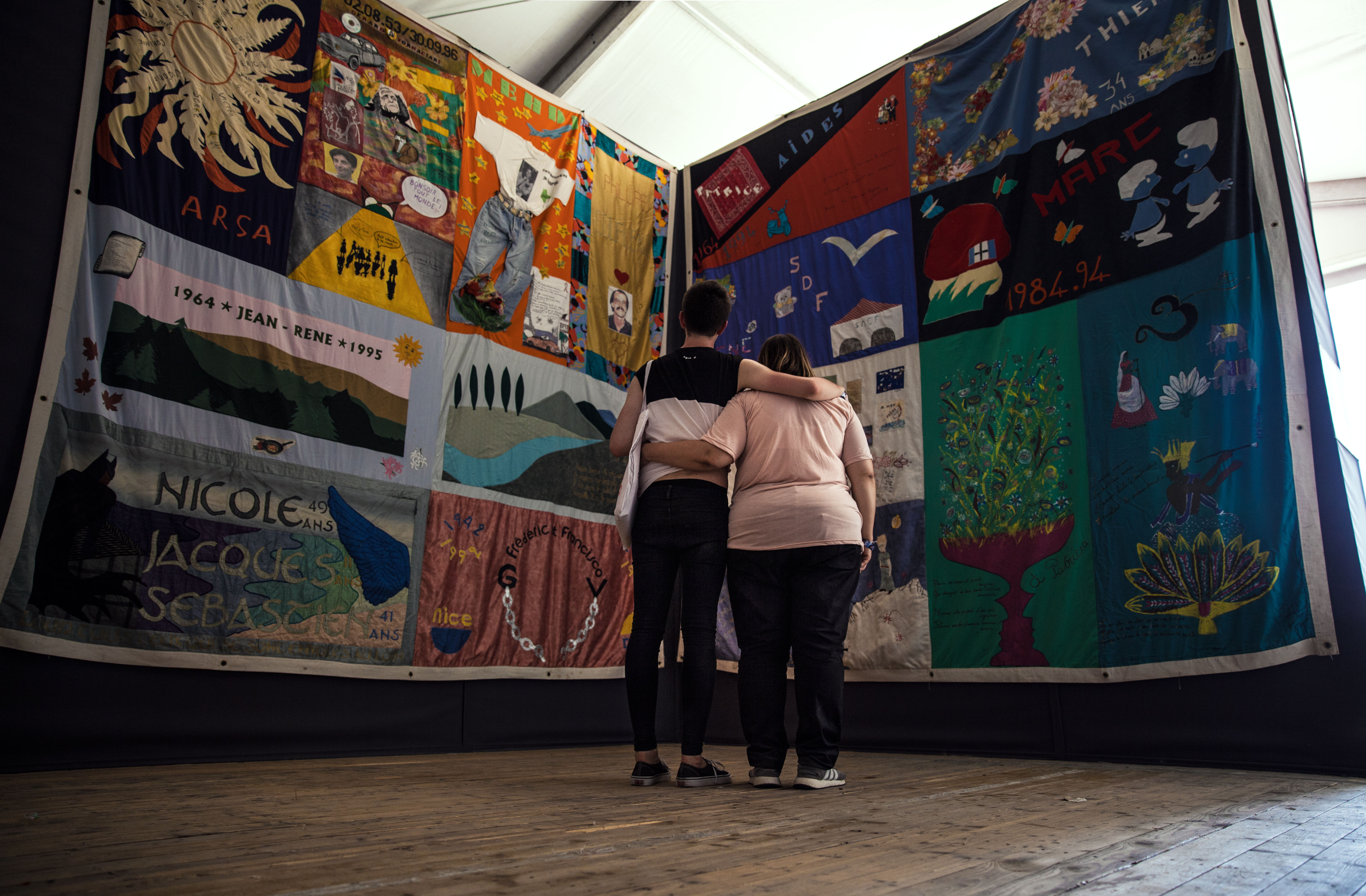 Chaque année, l'association "Patchwork des Noms" expose au public de Solidays